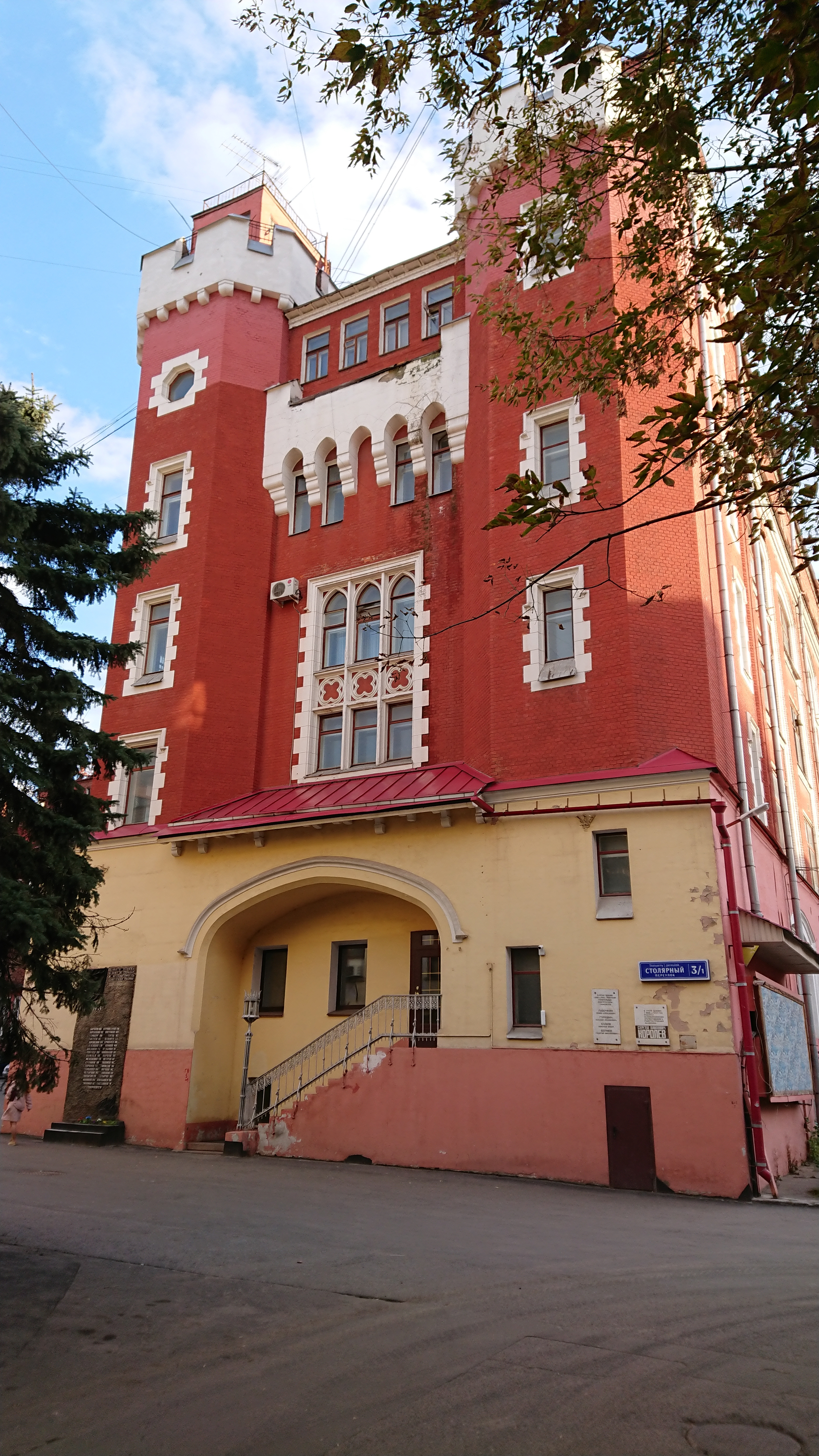 Здание мебельной фабрики Мюр и Мерилиз: Столярный пер., дом 3, корпус 1, Пресненский, Центральный округ, Москва